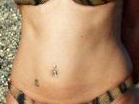 tułów kobiety, women's waist